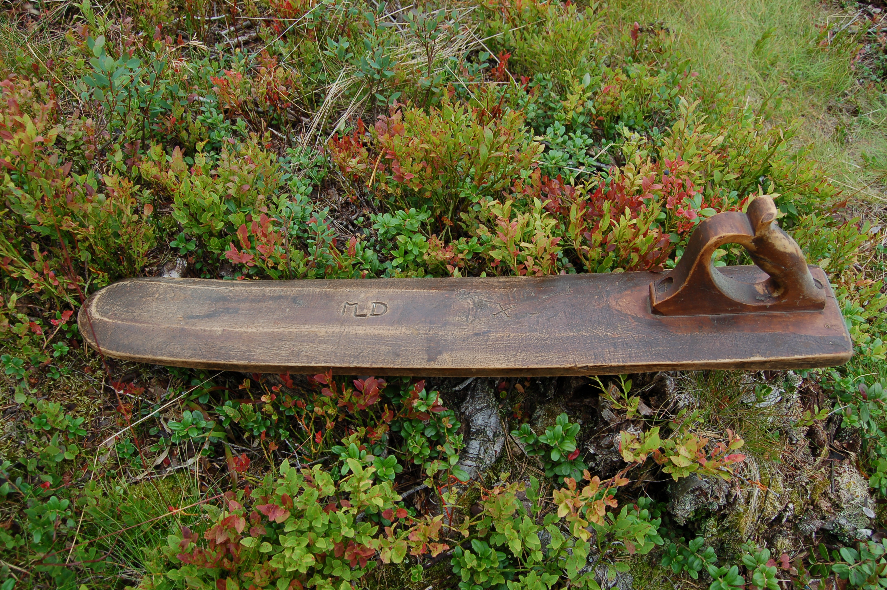 Mangletre fra Trøndelag